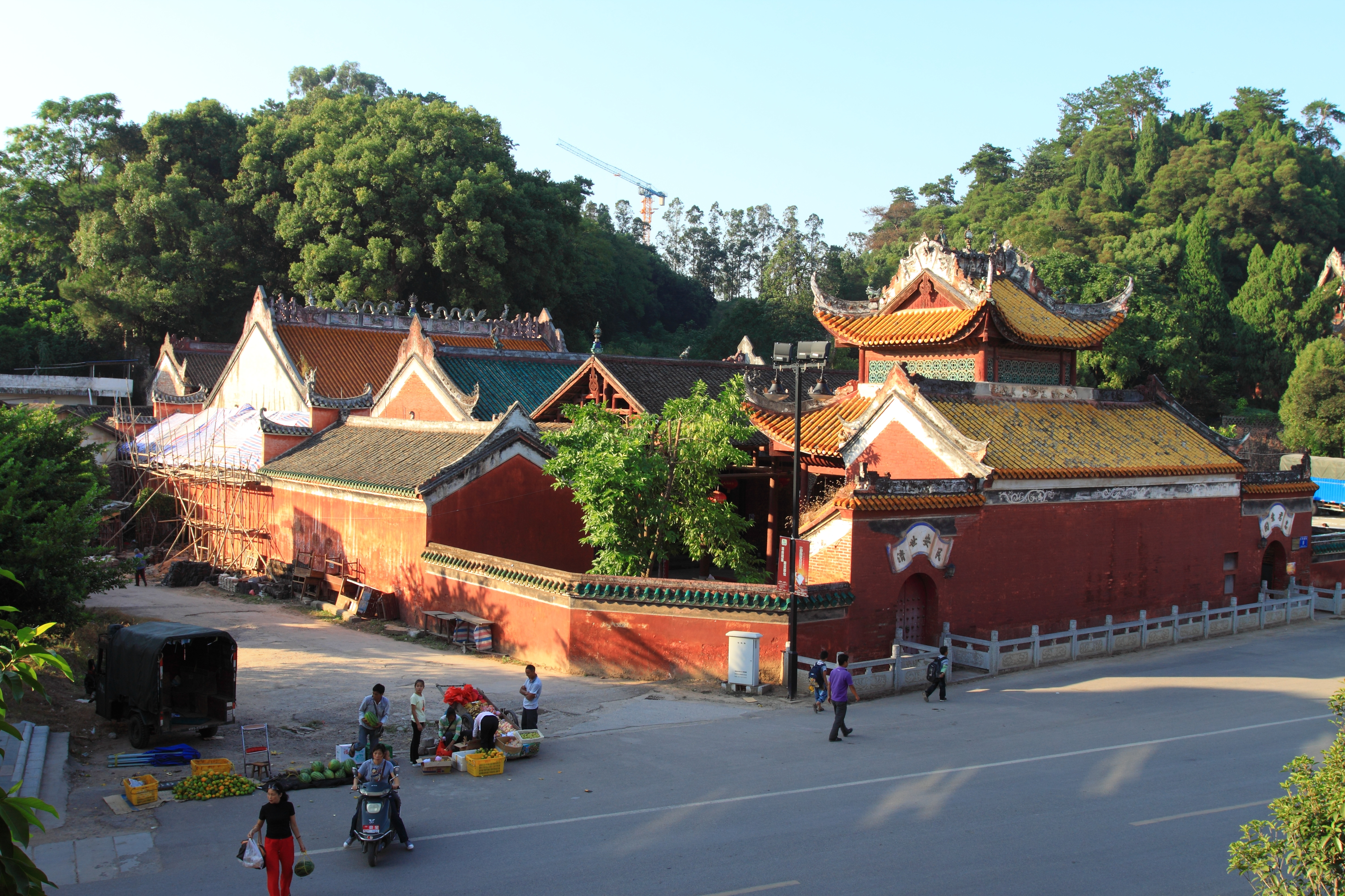 恭城武庙（关帝庙） —— 武庙全景